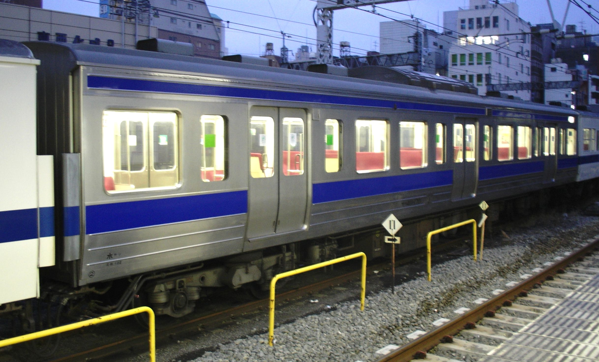 東日本旅客鉄道415系近郊形交直流電車 サハ411-1701.